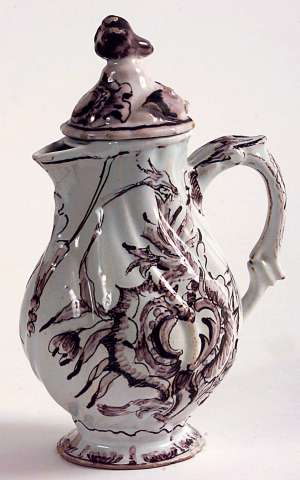 Kaffekanne produsert på Herrebøe Fayance-Fabrik, dekorert i manganarget dekor. H. 17 cm. Foto Anne-Lise Reinsfelt, Norsk Folkemuseum, NF.1937-0608AB.